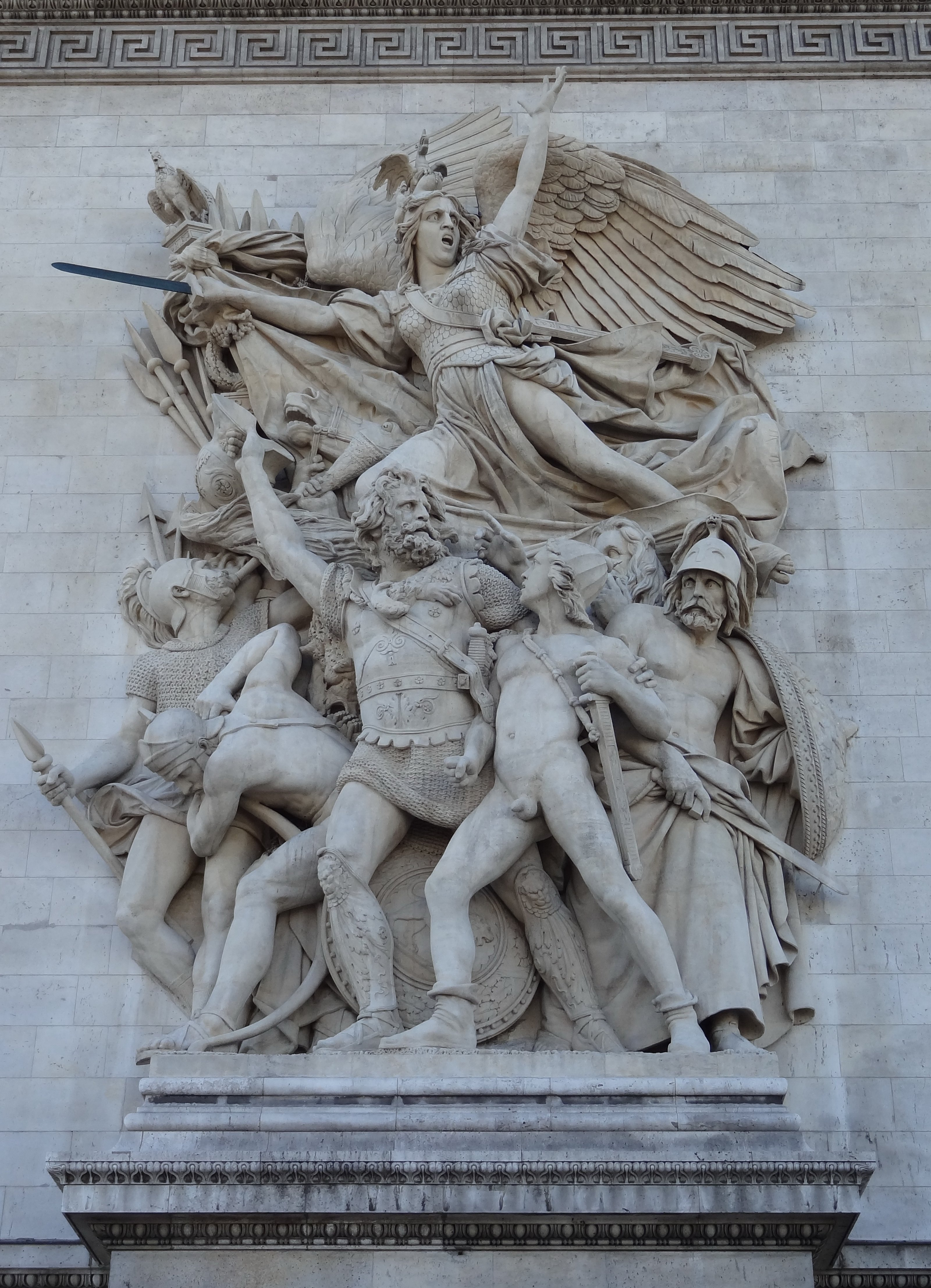 Le bas relief de la_marseillaise